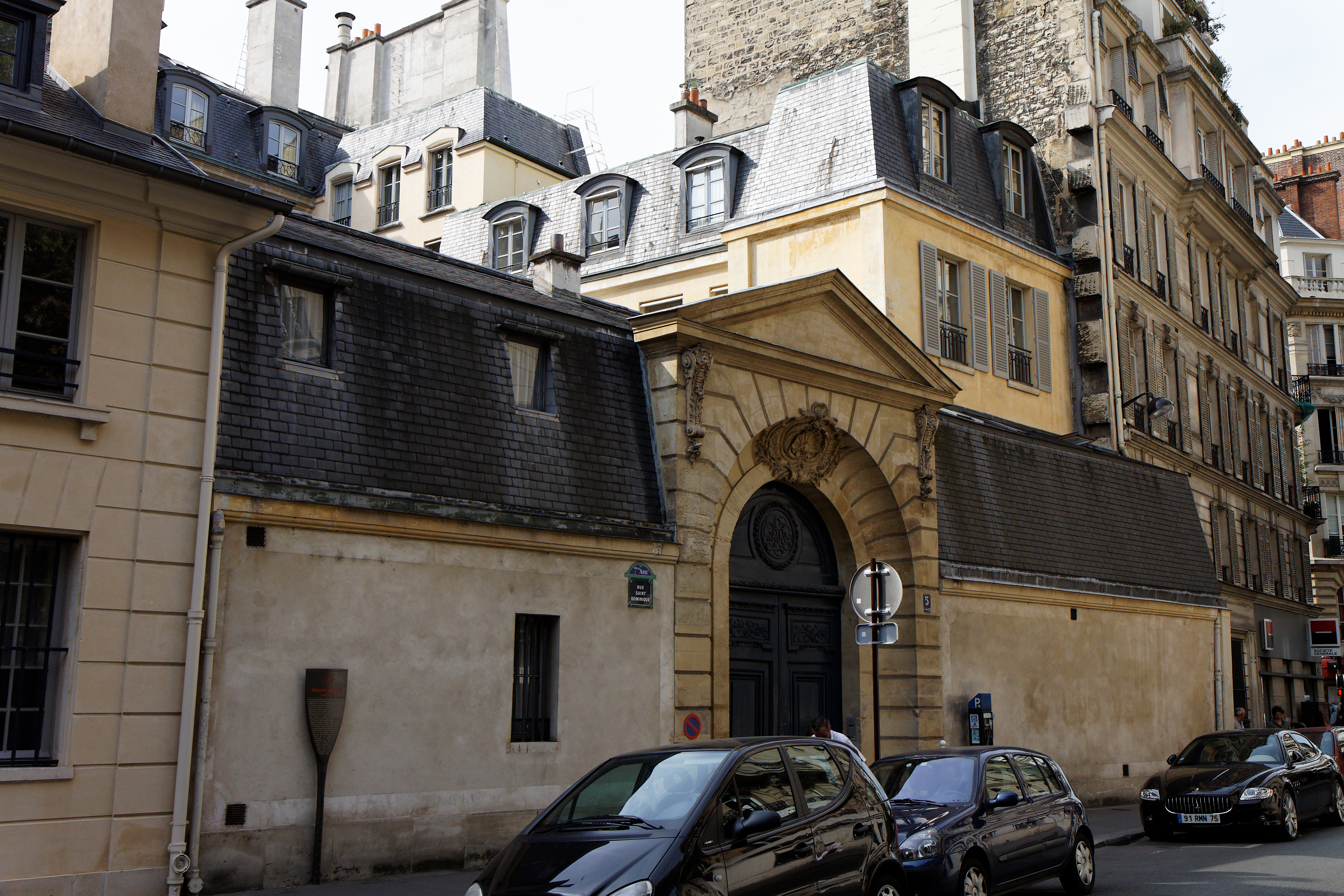 Un monument historique dans le 7ème arrondissement de Paris.